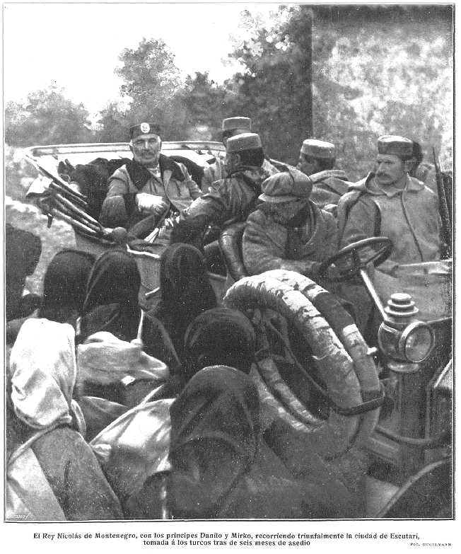 Nicholas I de Montenegro con los principes Danilo y Mirko recorriendo triunfalmente la ciudad de Escutari tomada a los Turcos tras de seis meses de asedio.